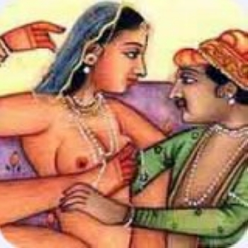 kâma sûtra